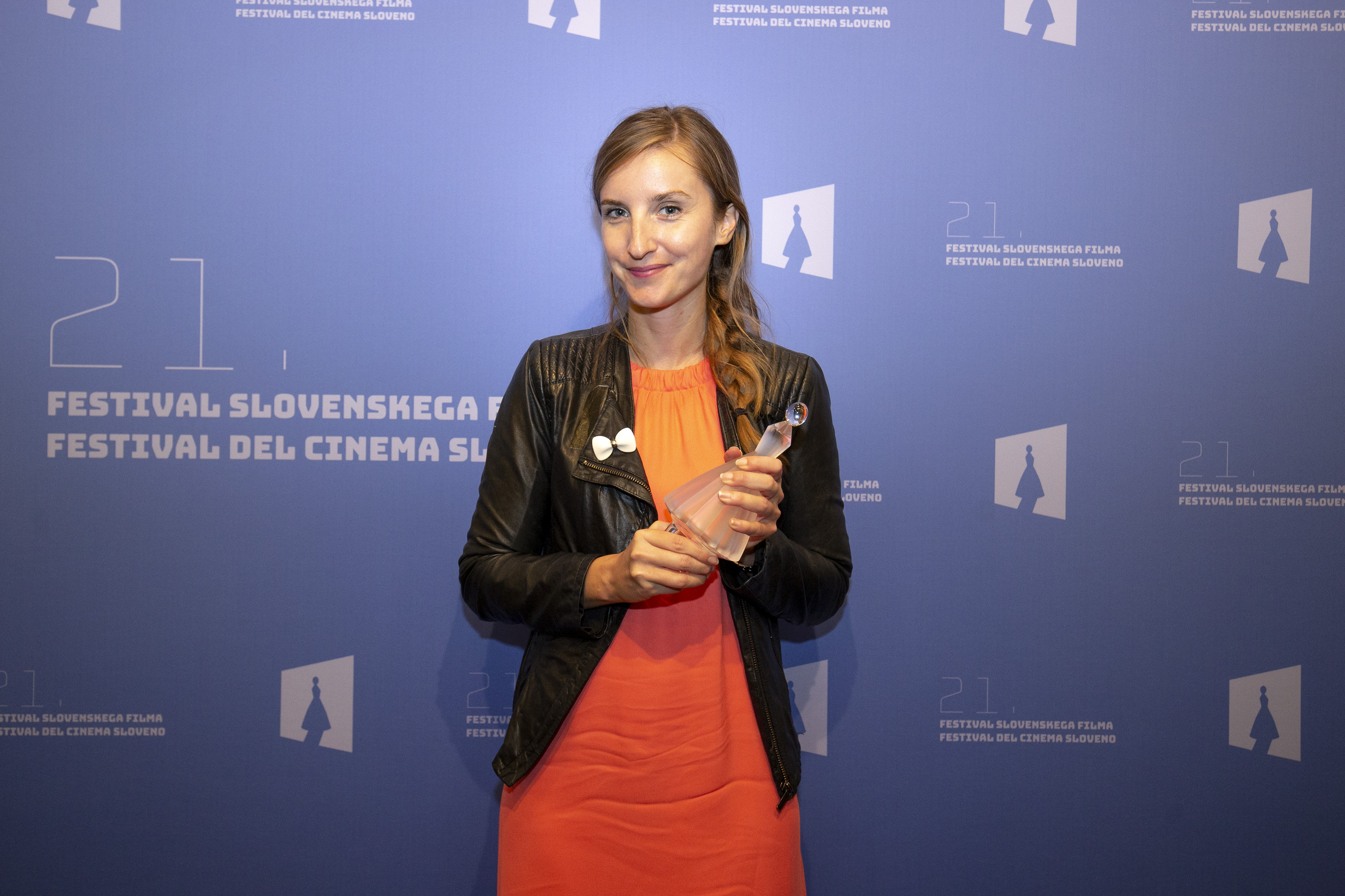 Urša Menart.